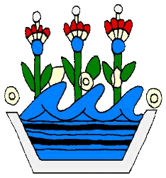 Glifo de Xochiatipan, Hidalgo